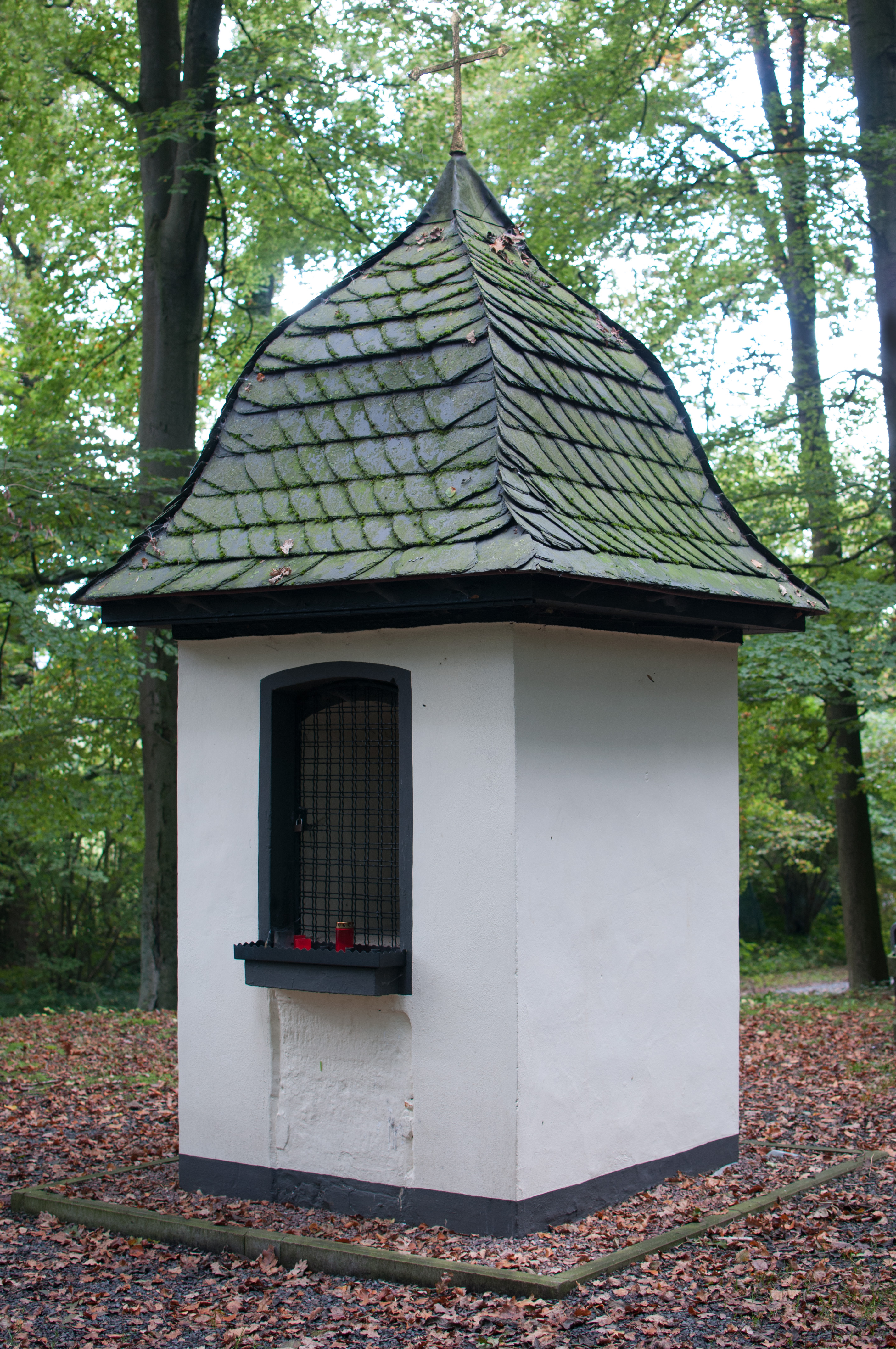 Antoniushäuschen, Zum Krähenbrink in Herdringen. This image shows a heritage building in Germany, located in the North Rhine-Westphalian city Arnsberg (no. DL 393).